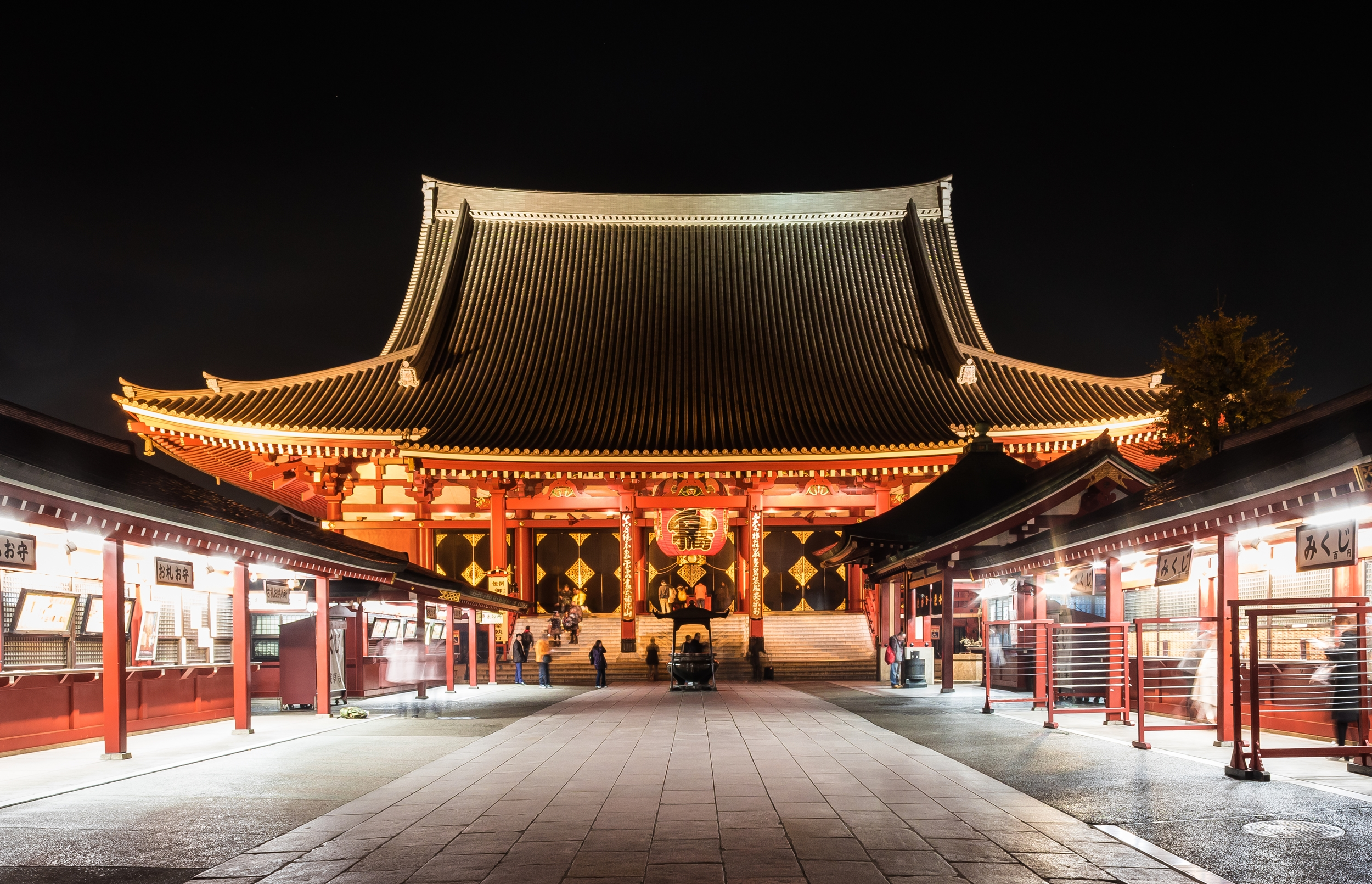 浅草寺本堂のライトアップ